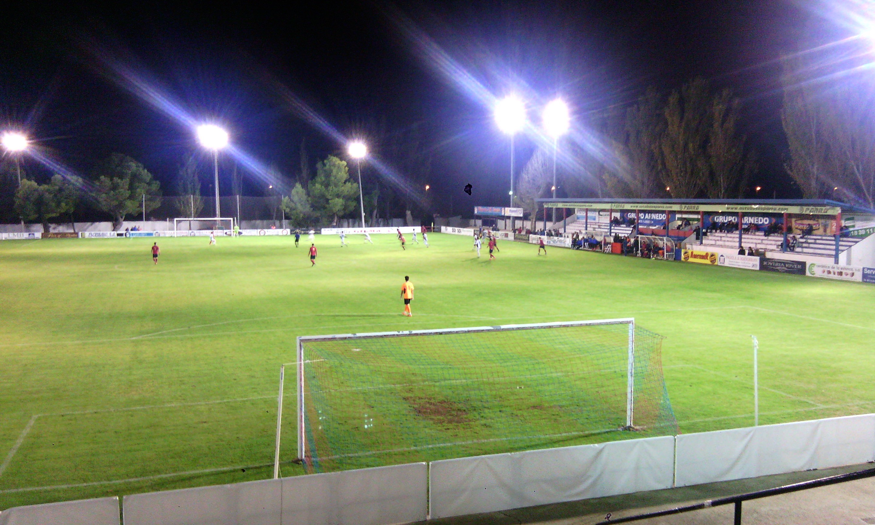 Partido amistoso entre el Calahorra vs Tudelano